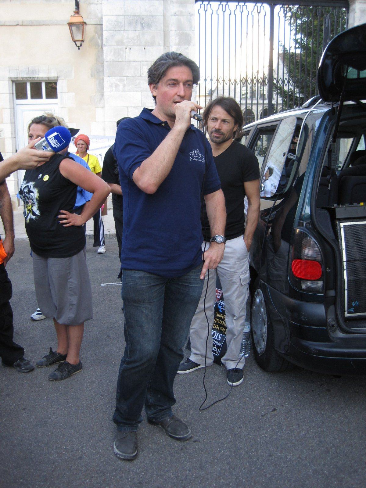 Christophe Marie, porte-parole de la Fondation Brigitte-Bardot à la manifestation du 8/9/2012 à Auxerre pour la fermeture du centre d'élevage du domaine des Souches (CEDS), plus grand élevage de chiens destinés aux laboratoires de France et d'Europe